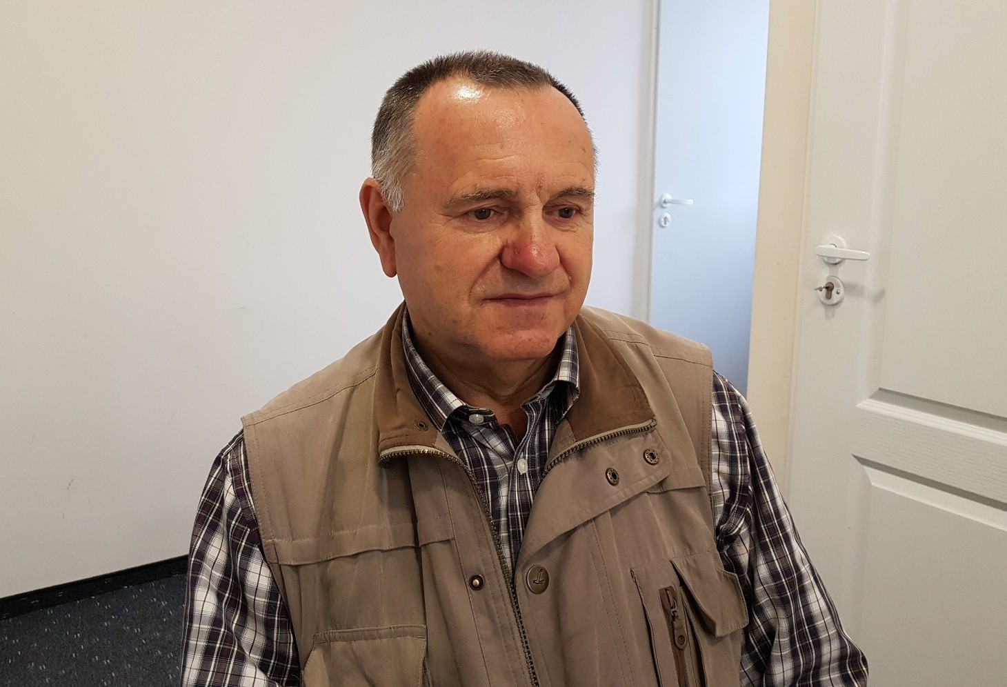 Jan Stolarczyk